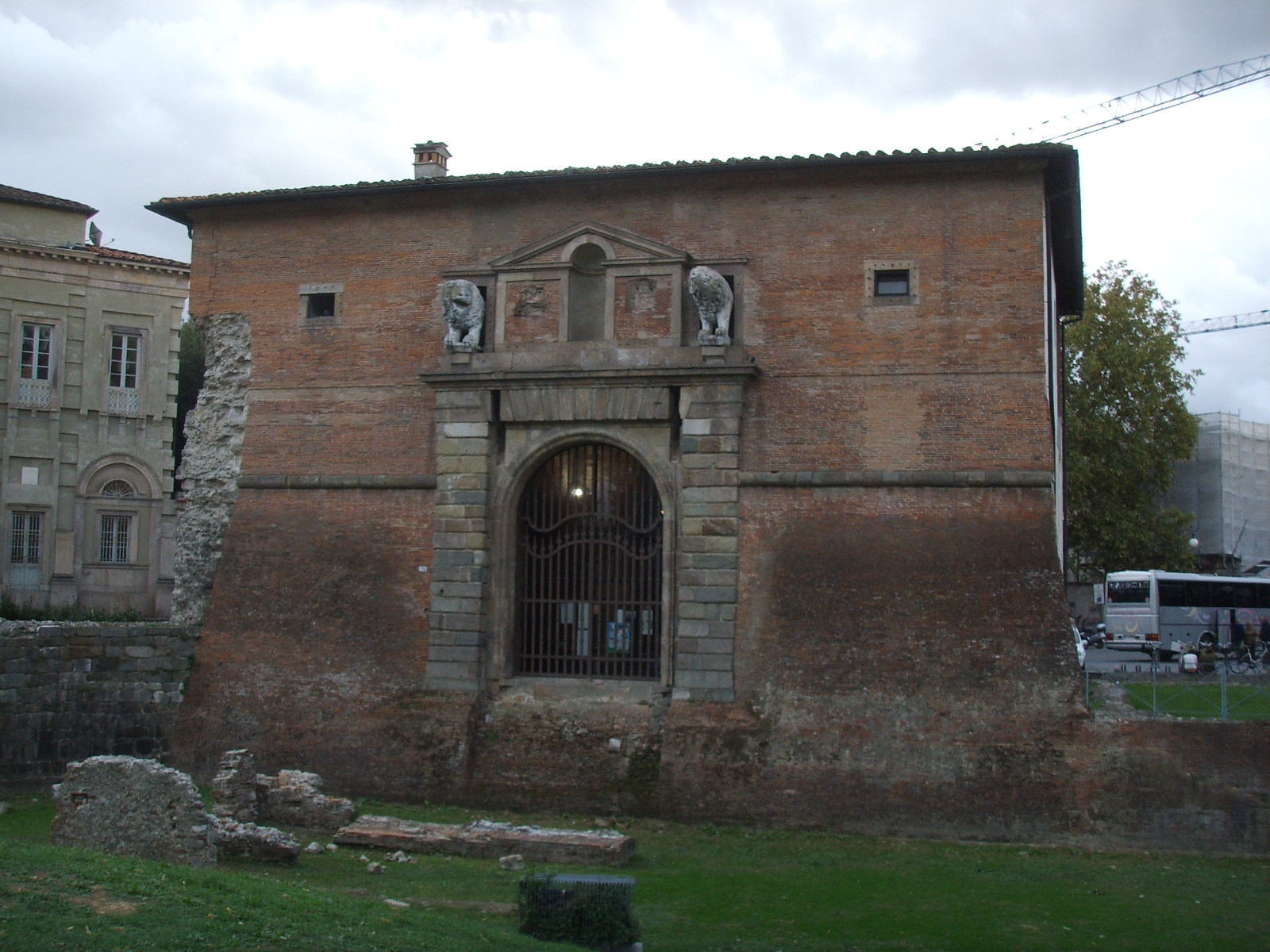 Lucca, edificio vicino alle mura